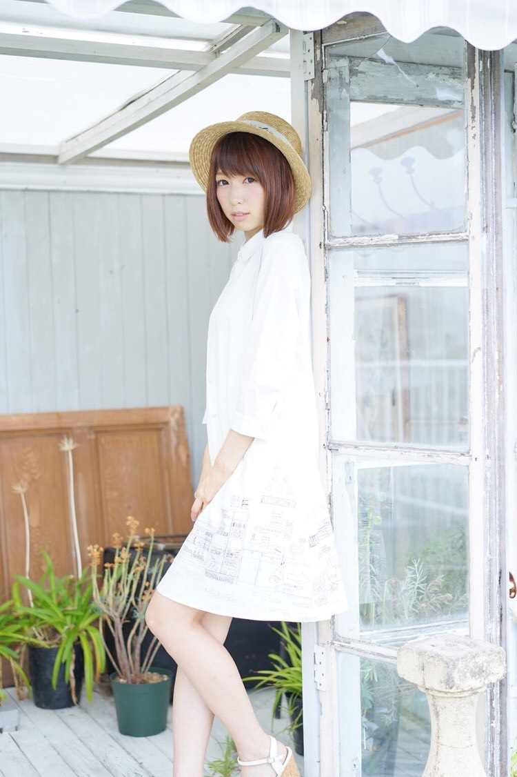 清瀬まち